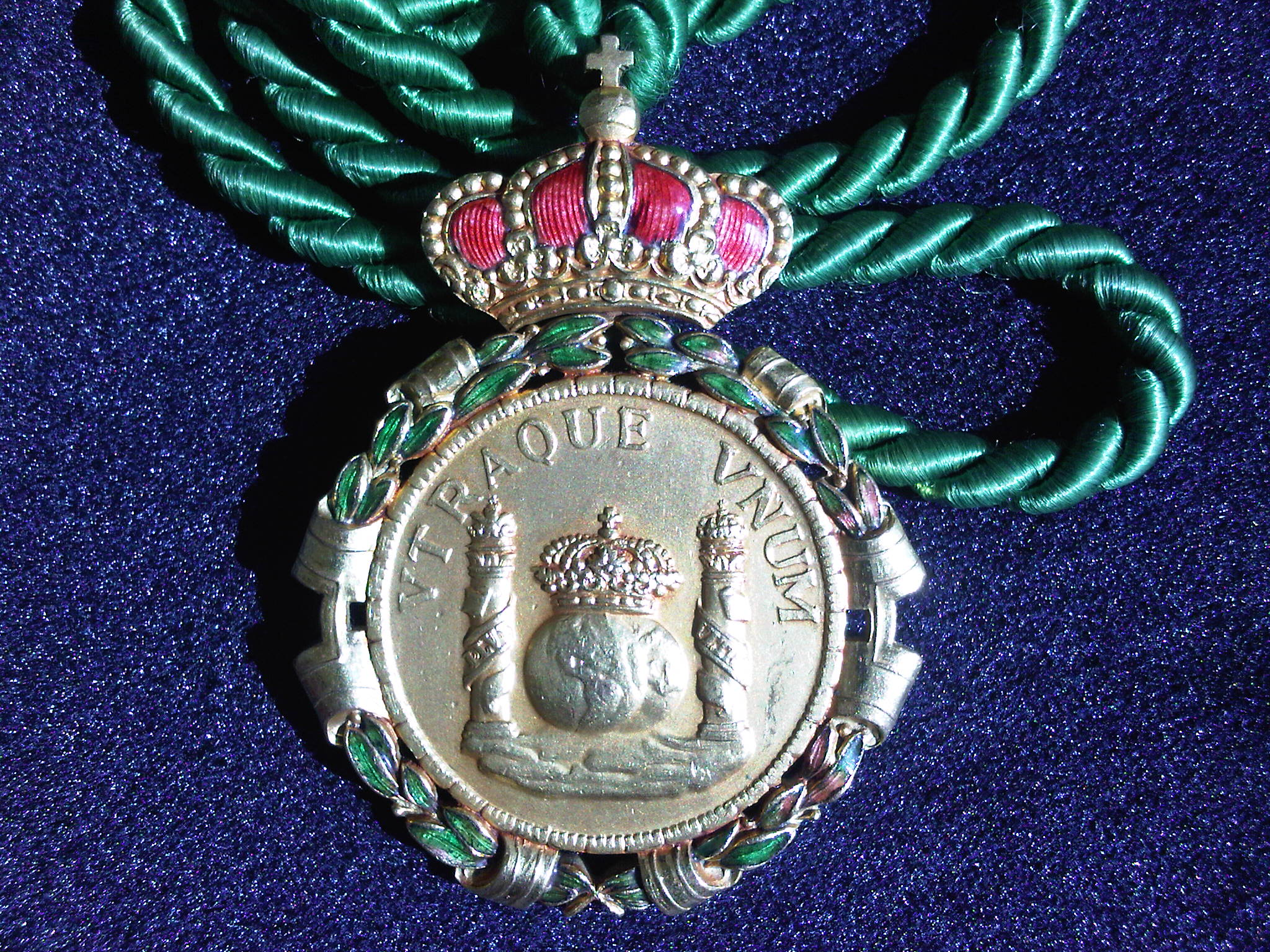 Medalla de la Real Academia de Ciencias Económicas y Financieras de España